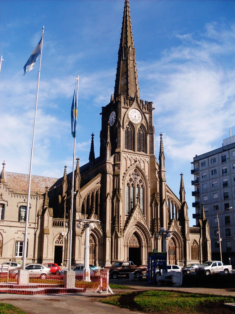 Iglesia Catedral Nuestra Señora del Rosario, Azul, Buenos Aires - Argentina